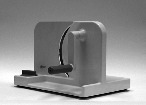 Allesschneider der Firma ritterwerk. Gestaltet von Prof. Karl Dittert 1967